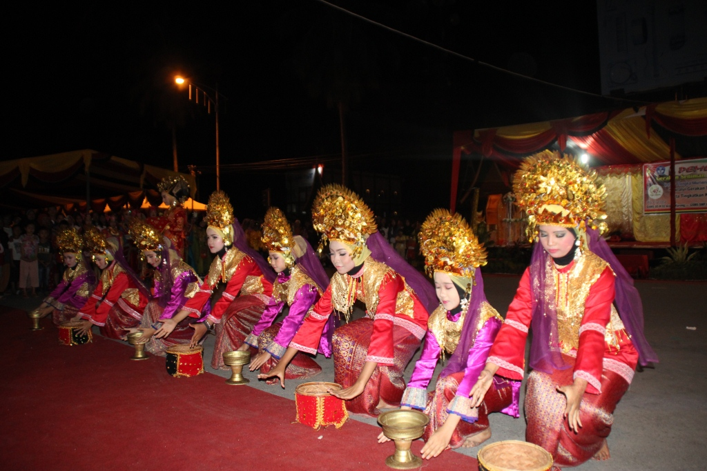 Tari Pasambahan adalah salah satu seni tari tradisonal Minangkabau yang berkembang di berbagai daerah di provinsi Sumatera Barat, Indonesia. Tarian ini ditampilkan dalam acara penyambutan tamu yang dimaksudkan sebagai ucapan selamat datang dan ungkapan rasa hormat kepada tamu kehormatan yang baru saja sampai.